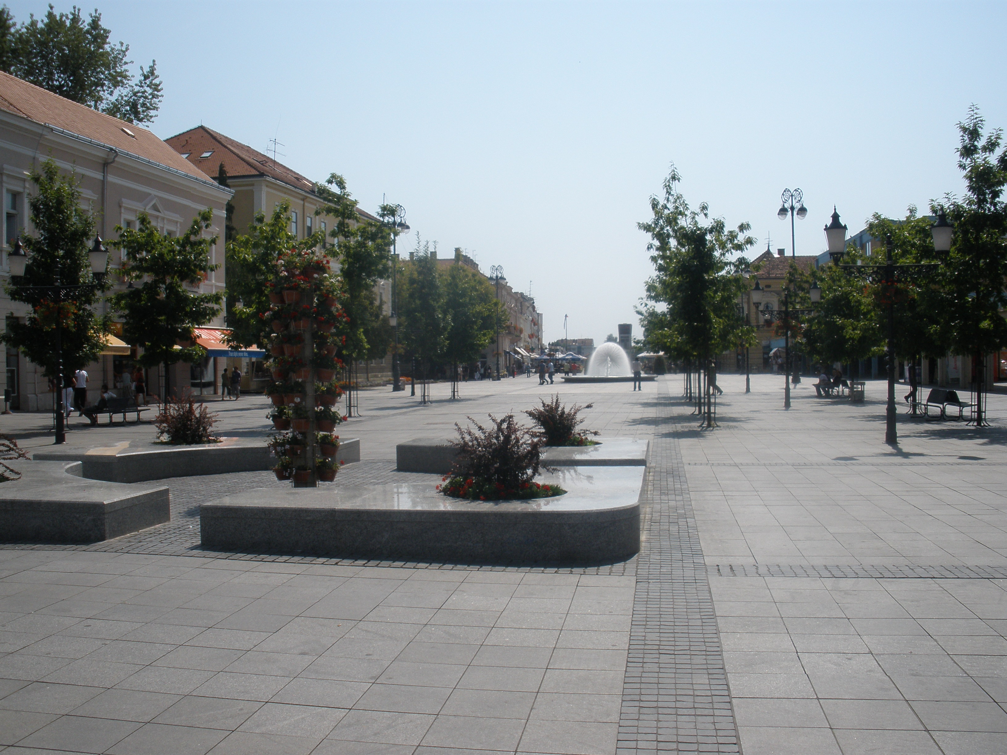 Korzo u Slavonskome Brodu (ljeto 2008.)